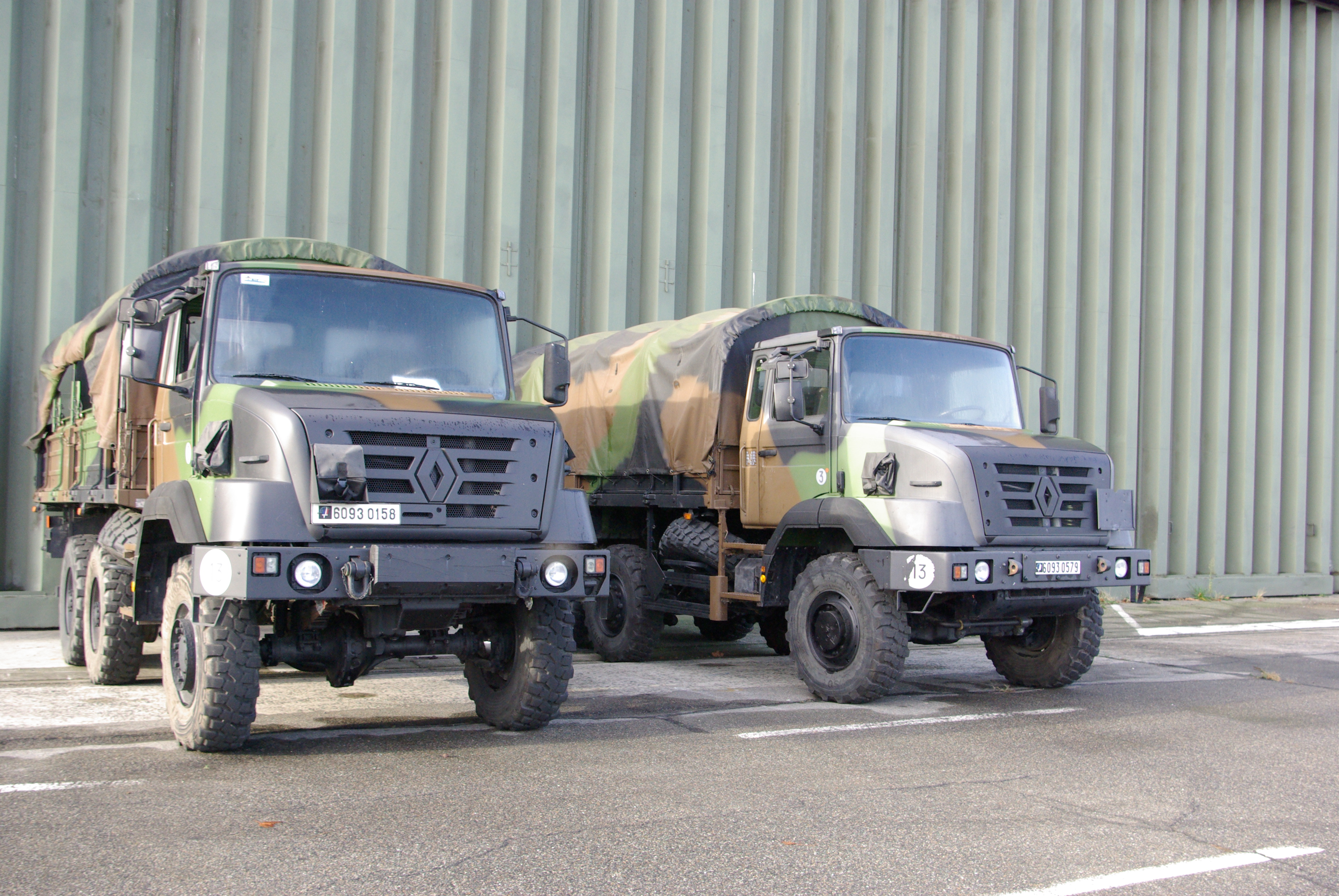 Renault GBC 180